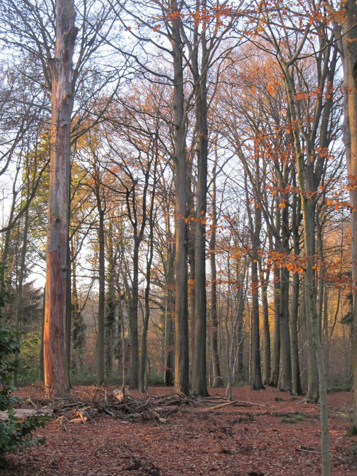 20111127 Groenhovebos